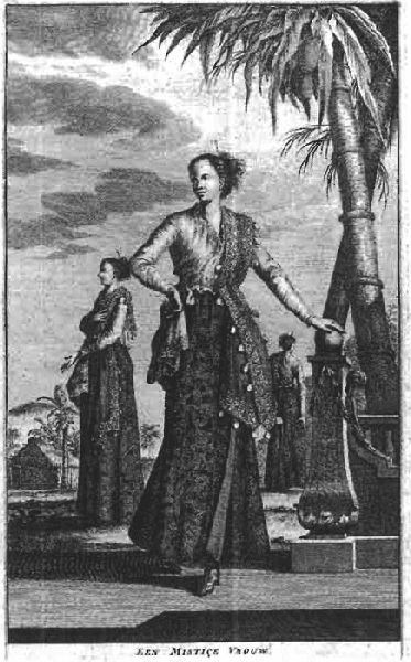 Een Mestiçe Vrouw. Een Euraziatische vrouw (Valentijn)